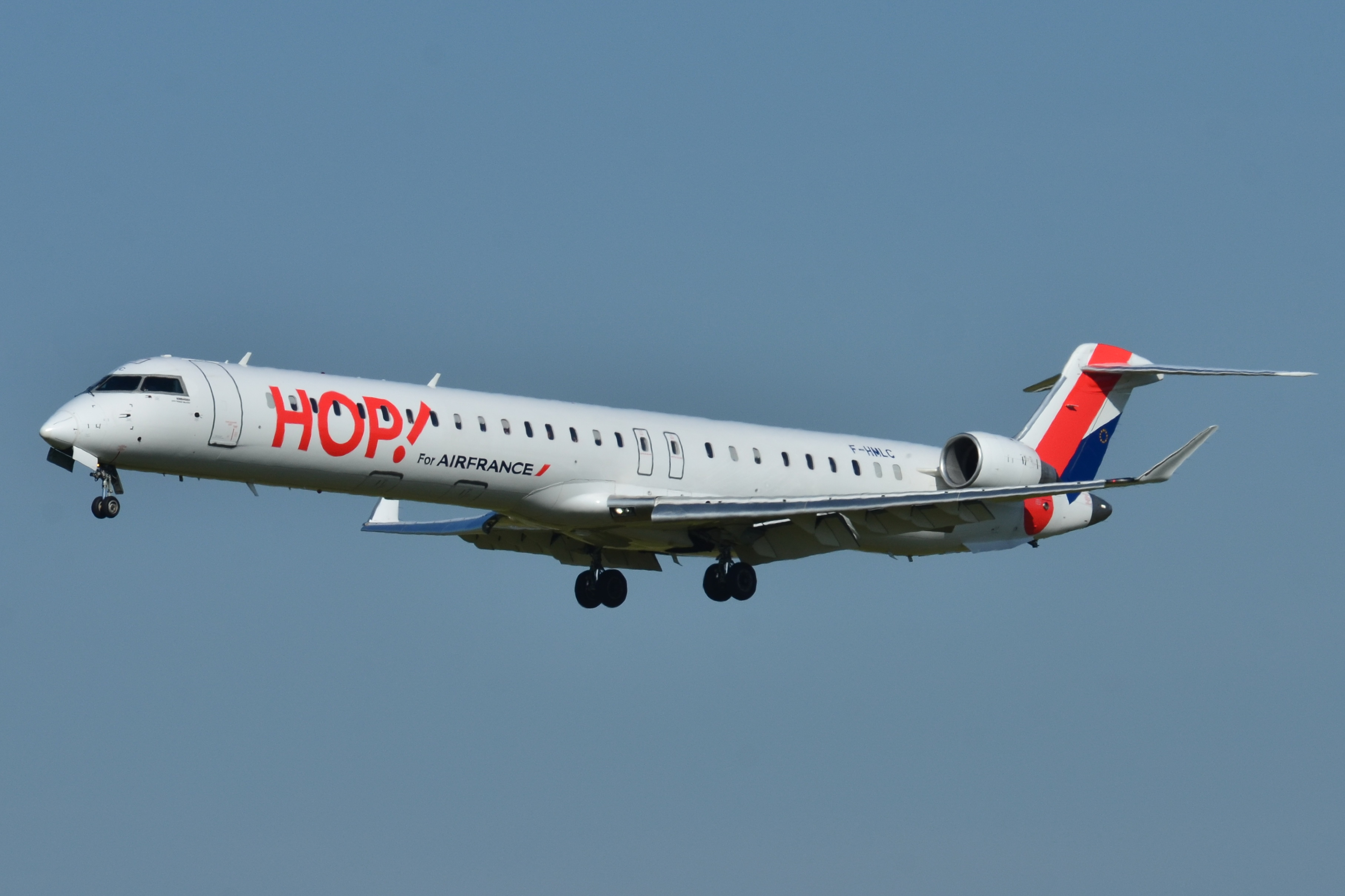 Photo prise à l'aéroport de Toulouse-Blagnac (LFBO) en France. Picture take at Toulouse-Blagnac Airport (LFBO) in France.